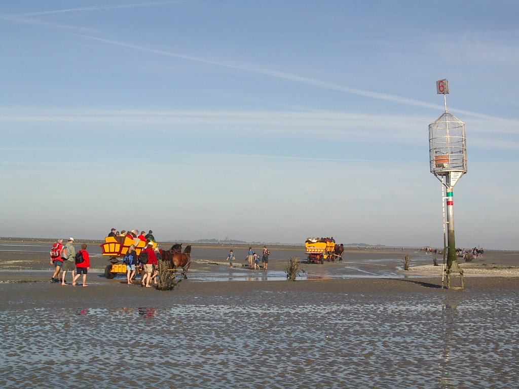 Wattwagen mit Tagestouristen durchqueren das Sahlenburger Watt bei Cuxhaven auf dem Weg nach Neuwerk